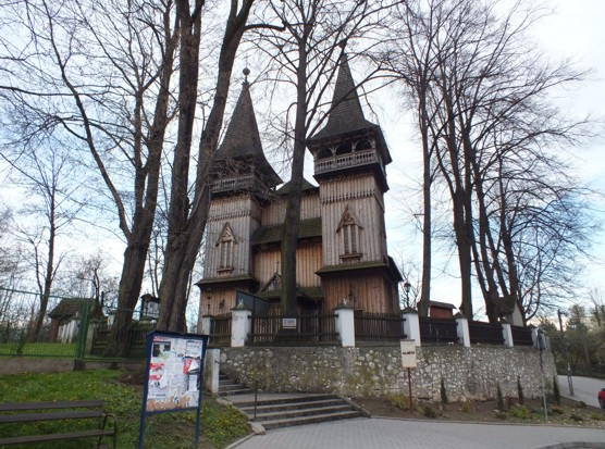 Kościół parafii Narodzenia NMP w Krzęcinie